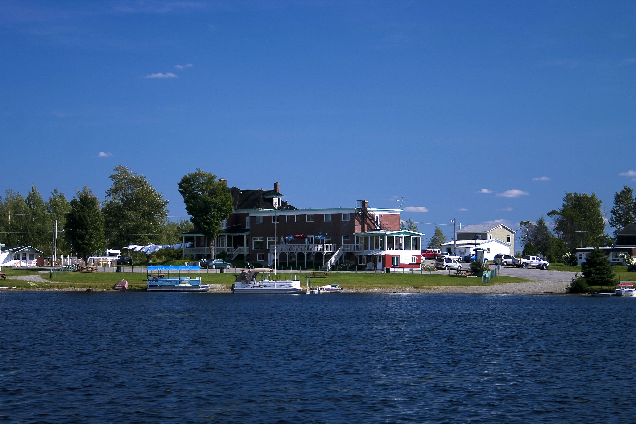 Lac Frontiere, Hotel du Lac